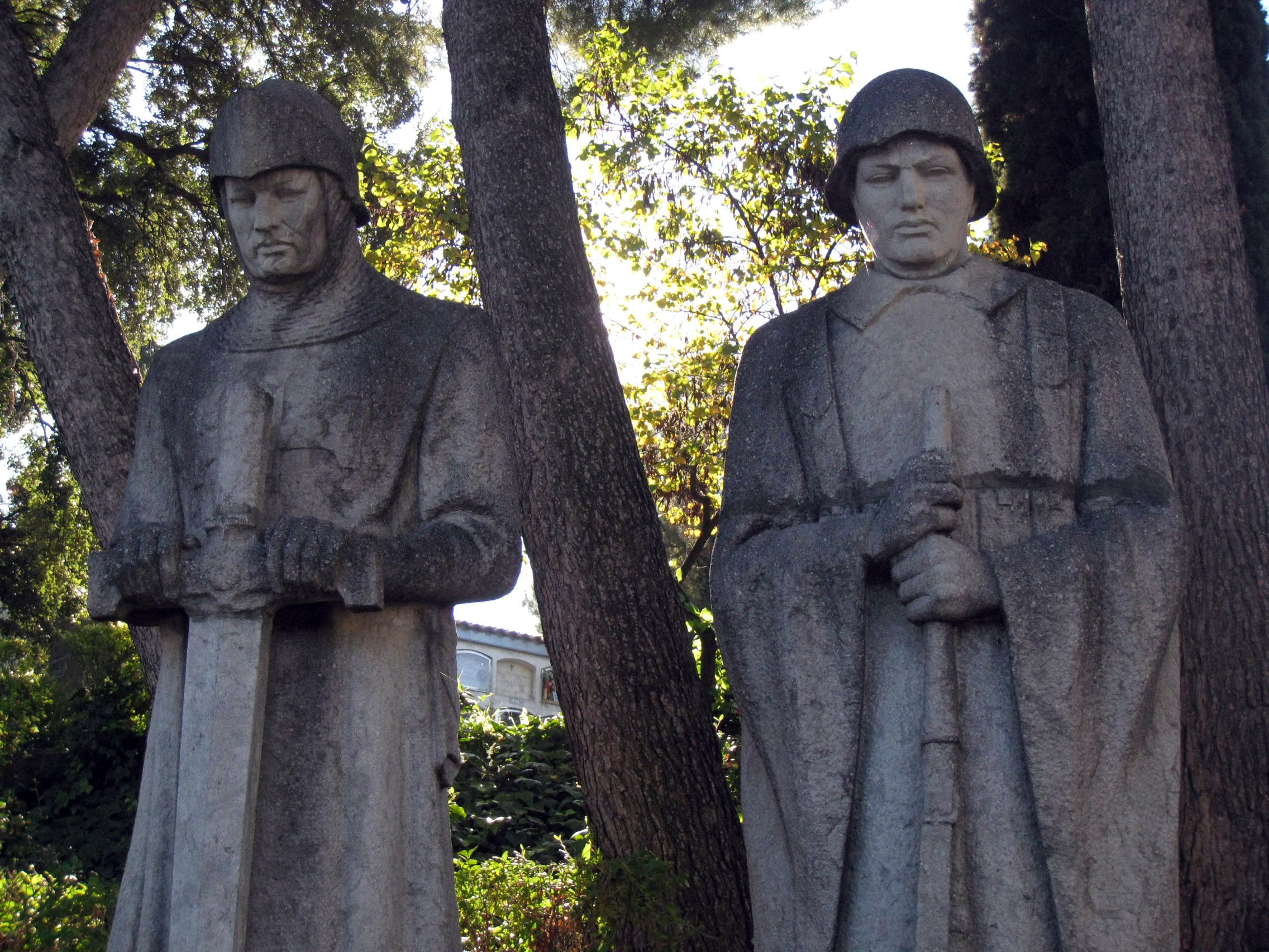 Monument als Caiguts (Terrassa) Object location41° 33′ 33.1″ N, 2° 02′ 37.82″ E